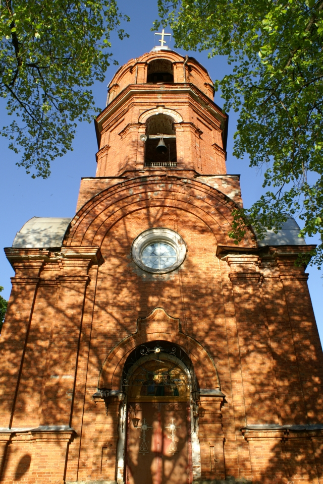 Фасад церкви Бориса и Глеба в деревне Вышгородок 1890 года постройки, заменившая прежнюю церковь 1690 года постройки. Возведён на средства помещика Владимира Изъединова и всего Вышегородского прихода.Освящена 17 сентября 1891 г.